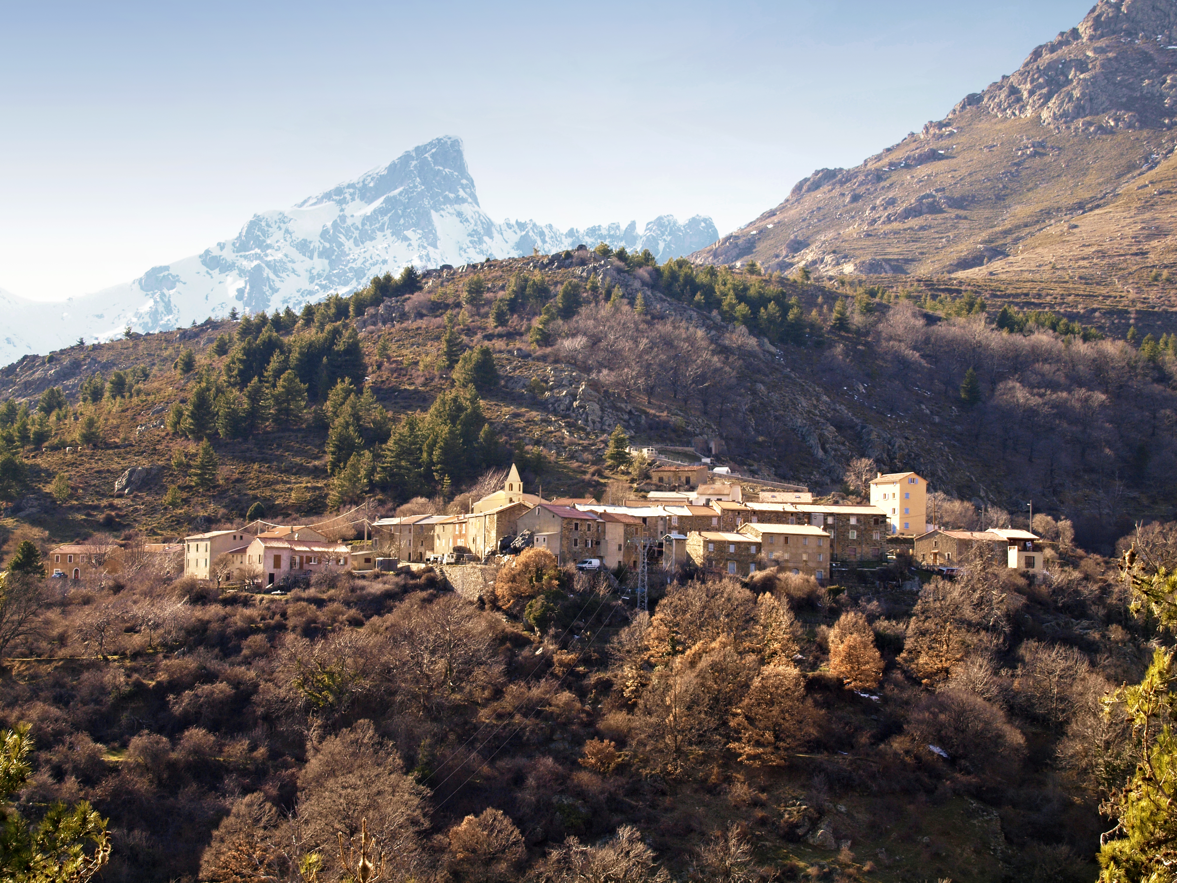 Albertacce (Corsica) - Vue de Calasima avec Paglia Orba